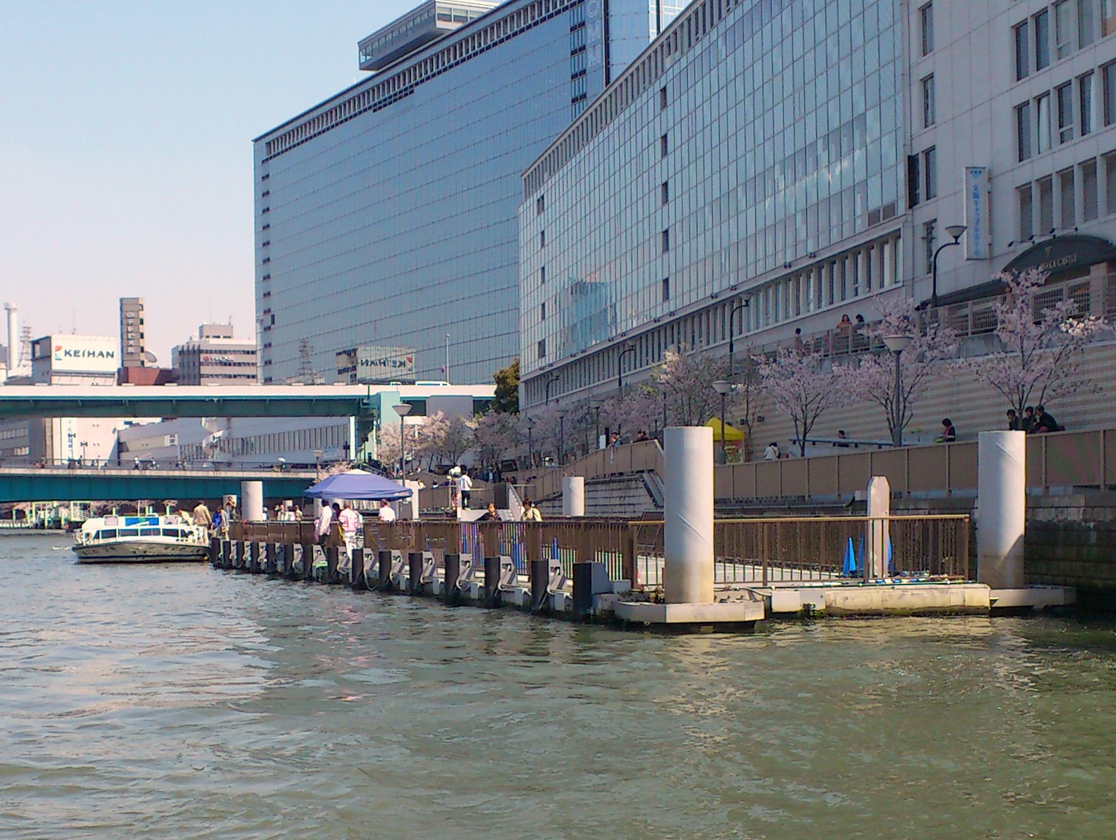 八軒家船着場（河口より）